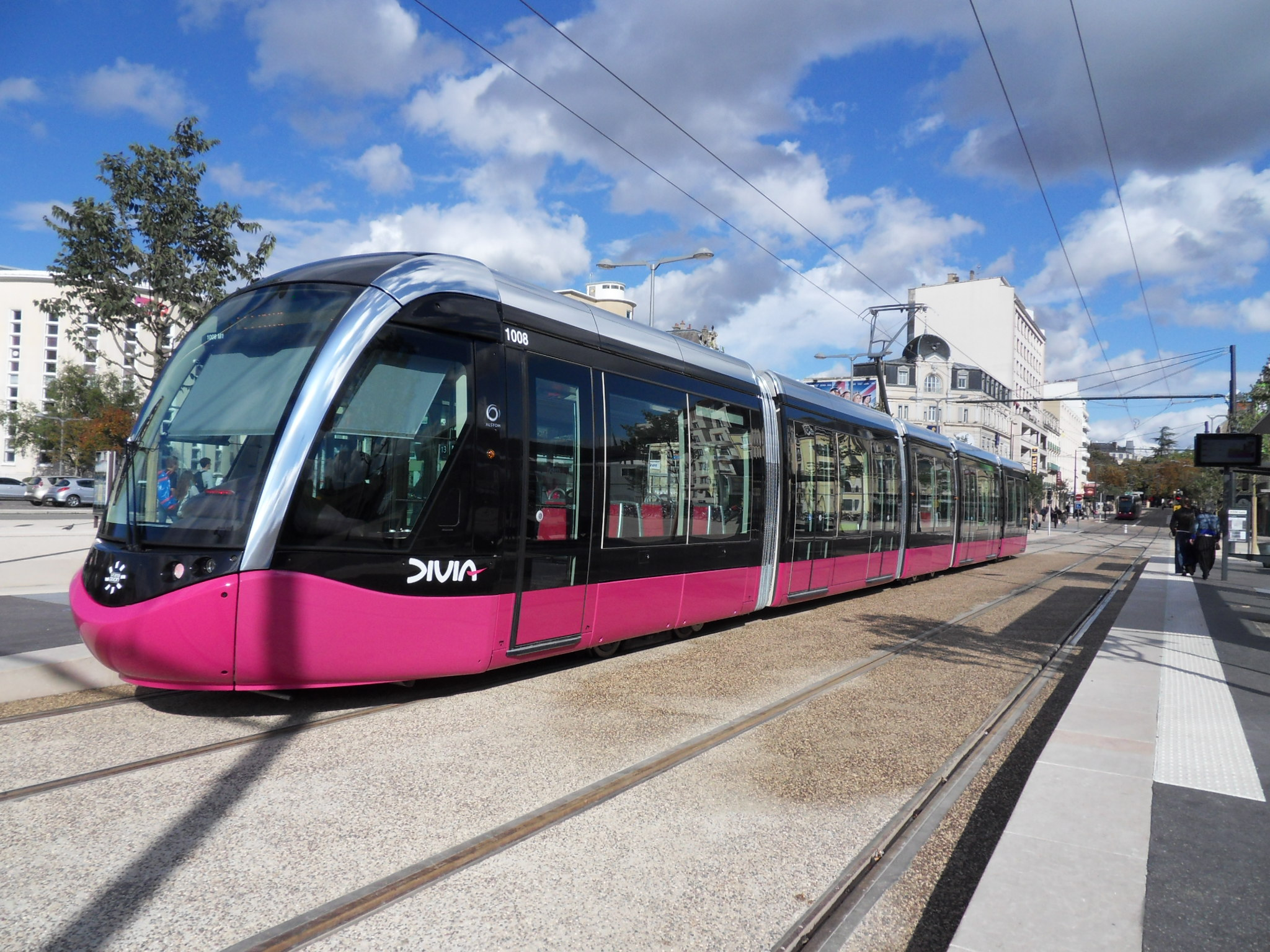 Tramway de Dijon à Foch-Gare